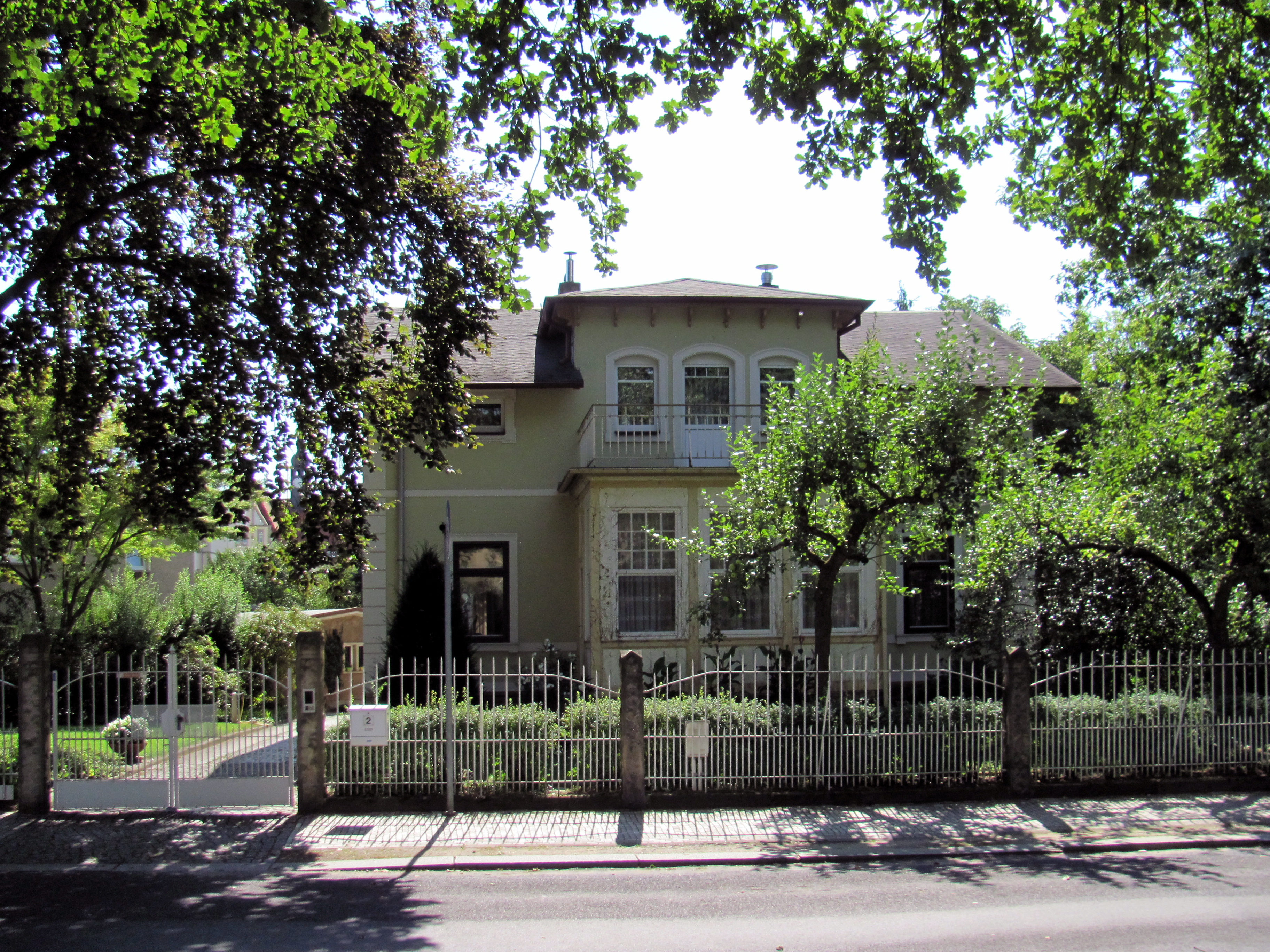 Radebeul (Gemarkung), Villa Lilys Heim